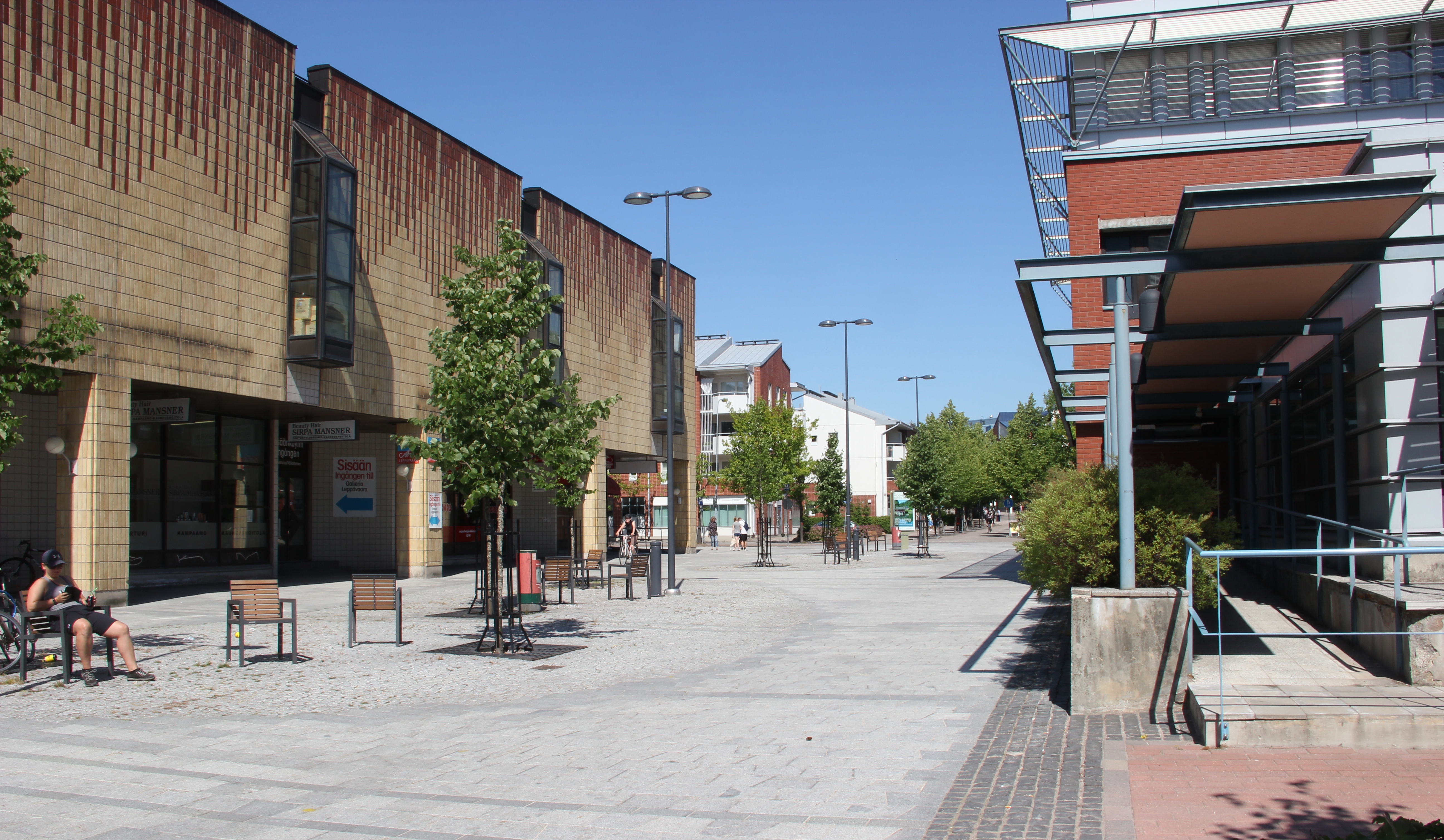 Leppävaaranraitti Tinurinkujalta katsottuna, vasemmalla Galleria, oikealla terveyskeskus.